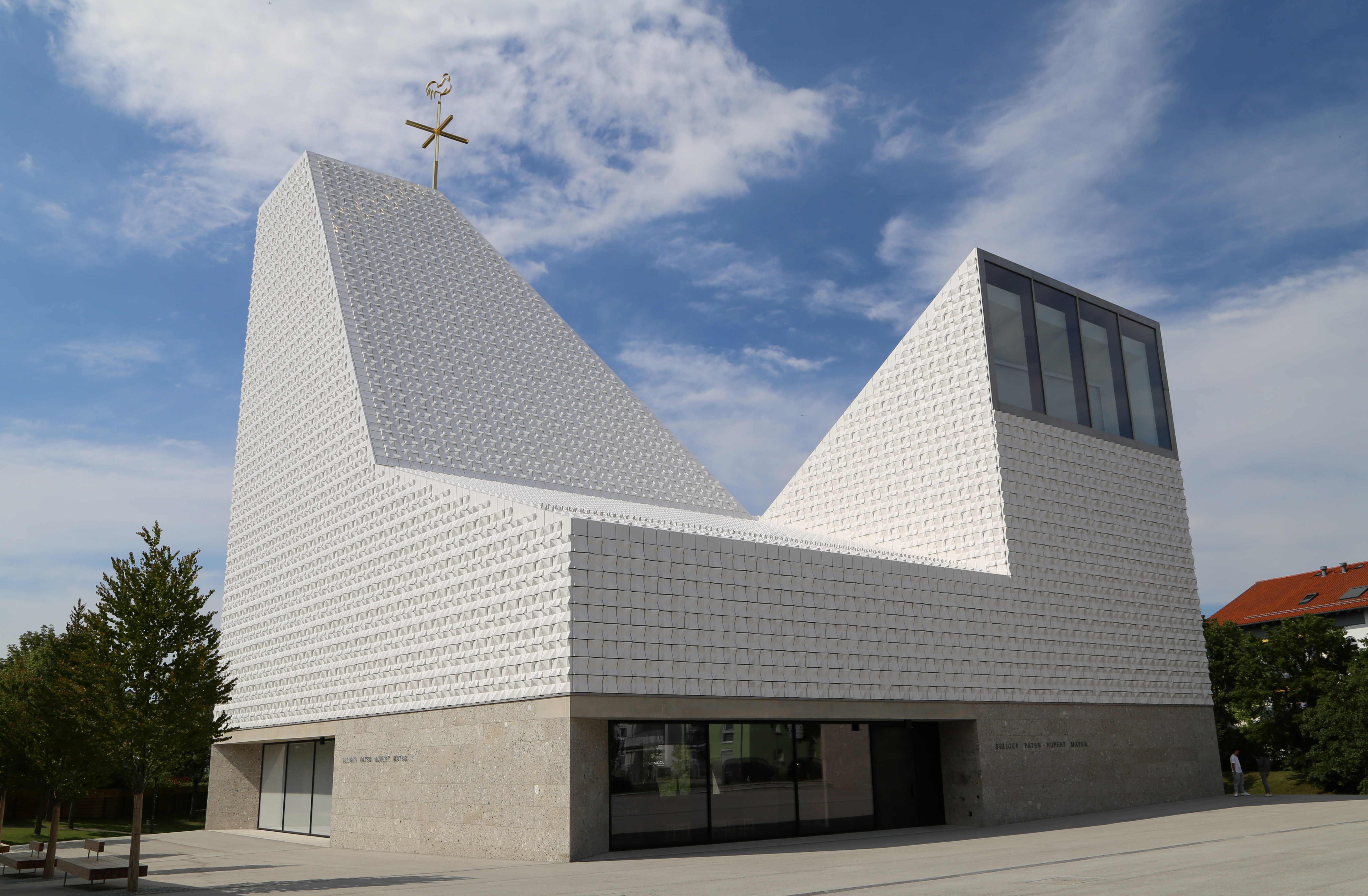 Pfarrkirche Seliger Pater Rupert Mayer, Poing; Architekt: Andreas Meck